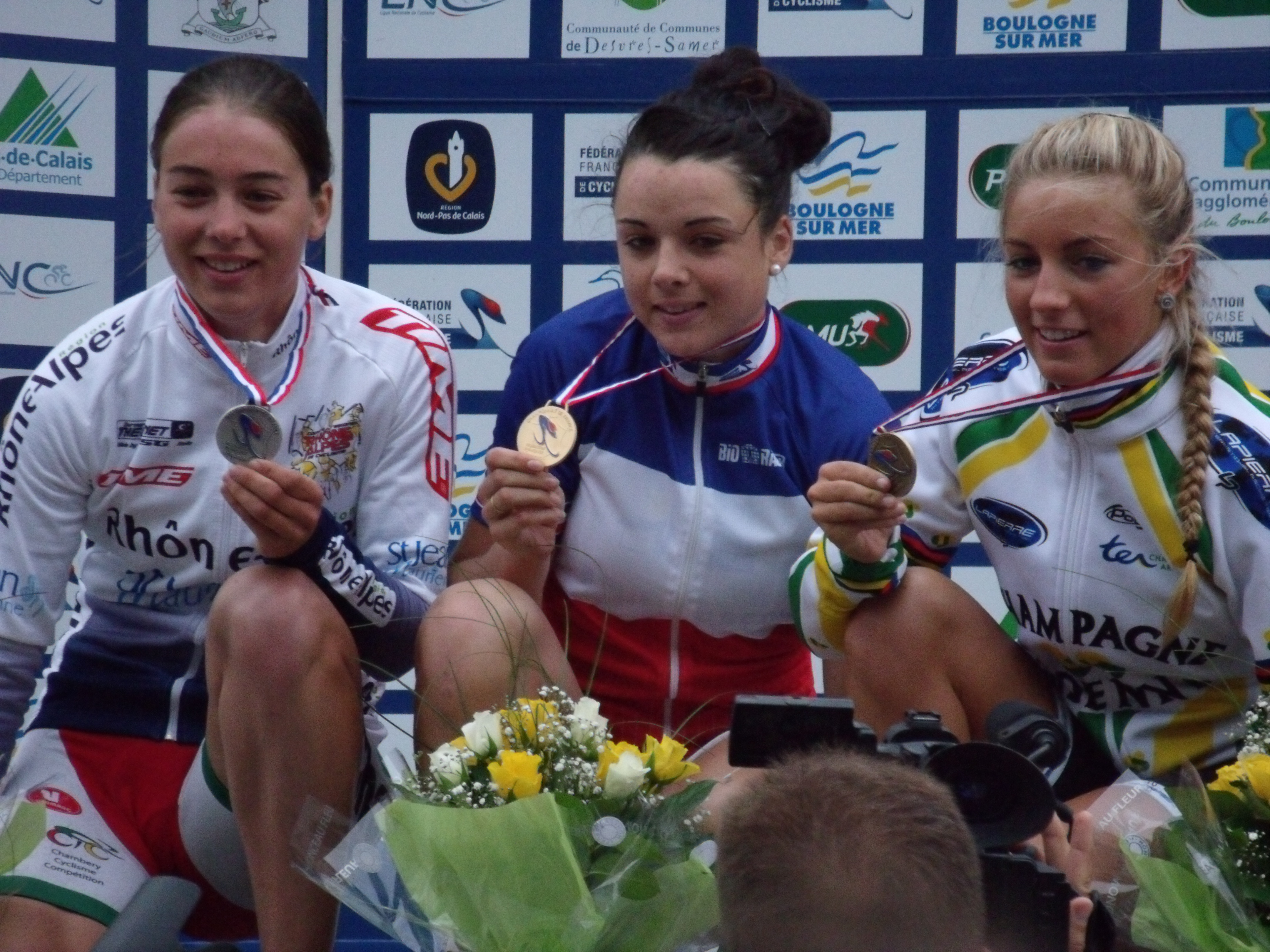 Amélie Rivat, Audrey Cordon et Pauline Ferrand-Prévot sur le podium du championnat de France sur route espoirs 2011